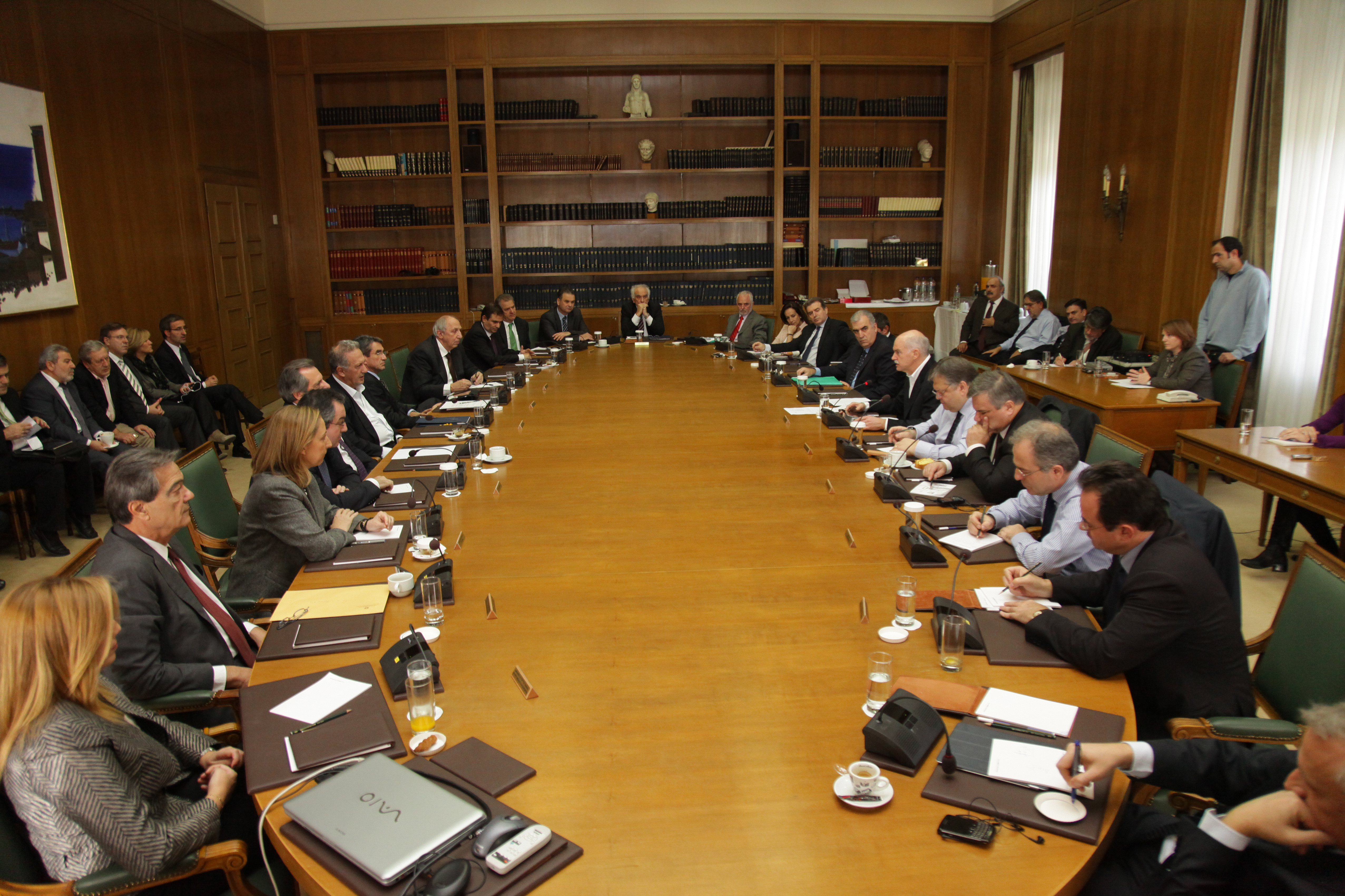 Συνεδρίαση του Υπουργικού Συμβουλίου Αίθουσα Υπουργικού Συμβουλίου, Κοινοβούλιο 8 Νοεμβρίου, 2011